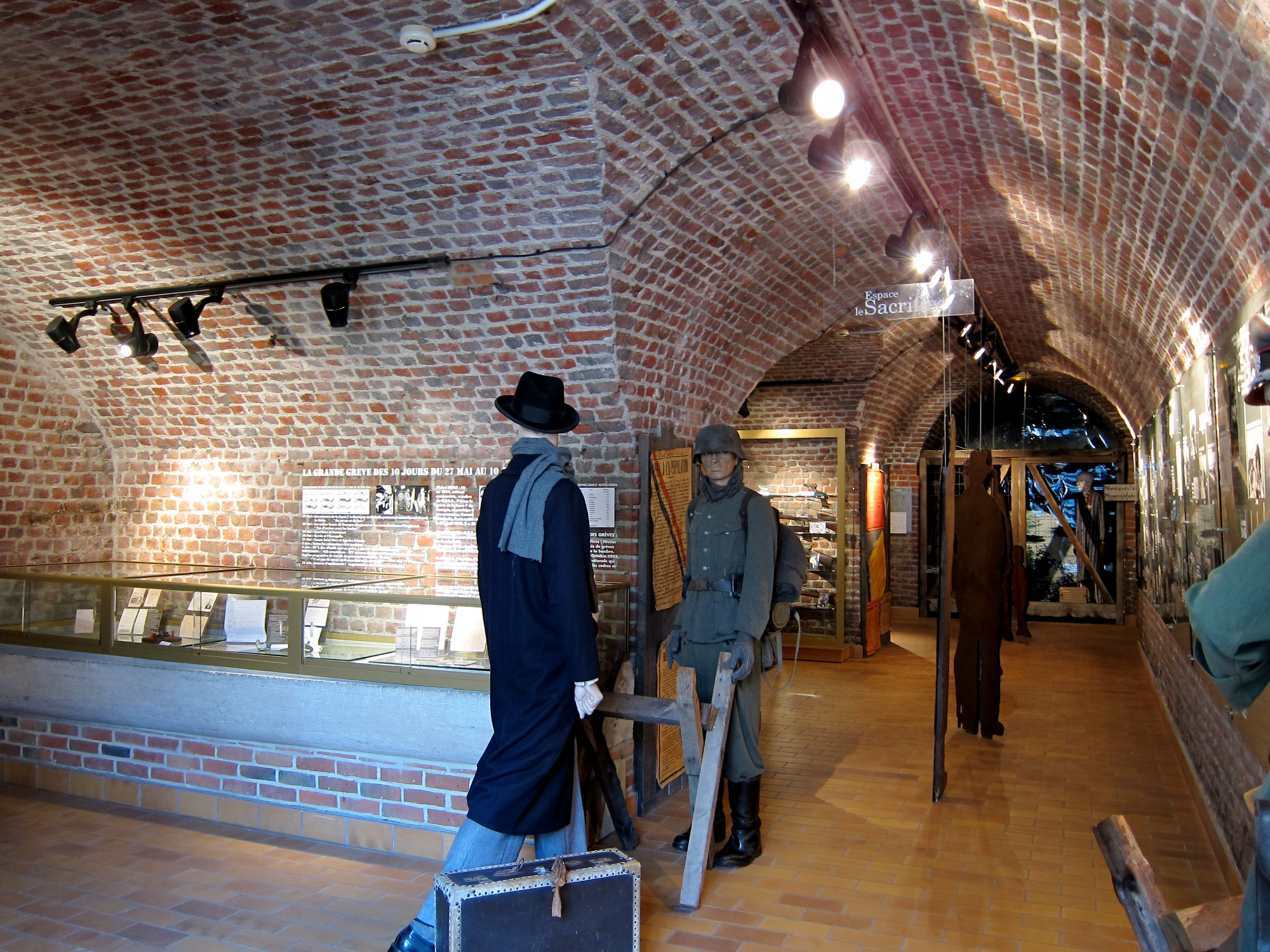 Salles du musée de la Résistance à Bondues (Nord).